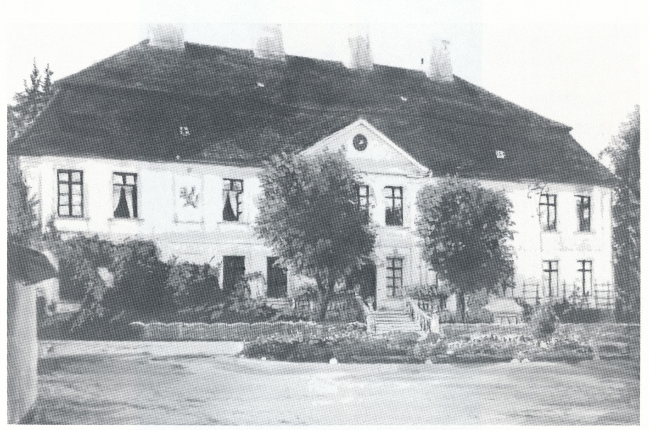 Herrenhaus der Familie von Puttkamer zu Bartin, Kr. Rummelsburg Datum: um 1880 Urheber: unbekannt Quelle: Ellinor von Puttkamer (Bearbeiterin): Geschichte des Geschlechts v. Puttkamer (= Deutsches Familienarchiv, Band 83–85). 2. Auflage, Degener, Neustadt an der Aisch 1984, ISBN 3-7686-5064-2, S. 803